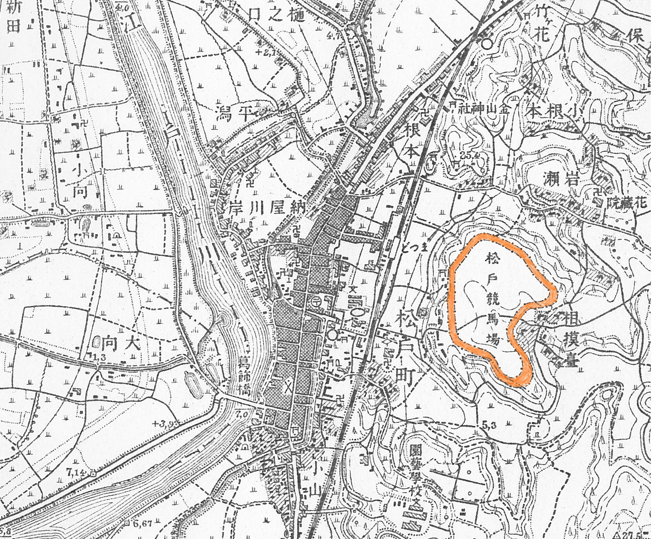 松戸駅周辺図 1917年(大正6年)測量